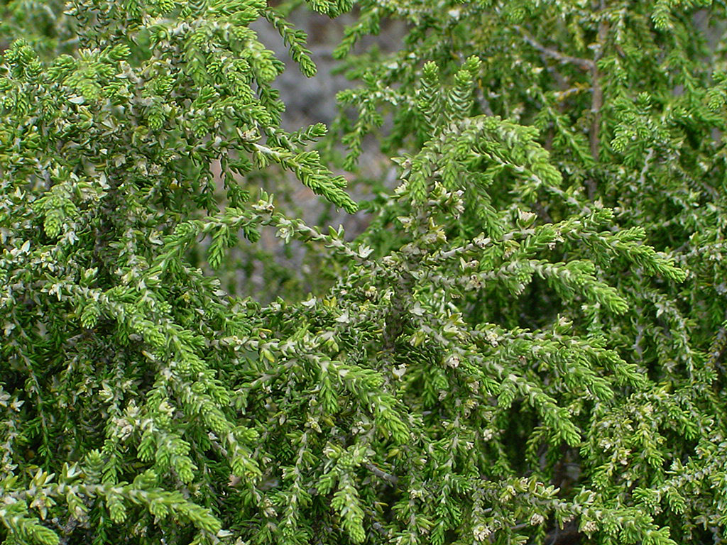 Passerine hérissée (Thymelaea hirsuta)